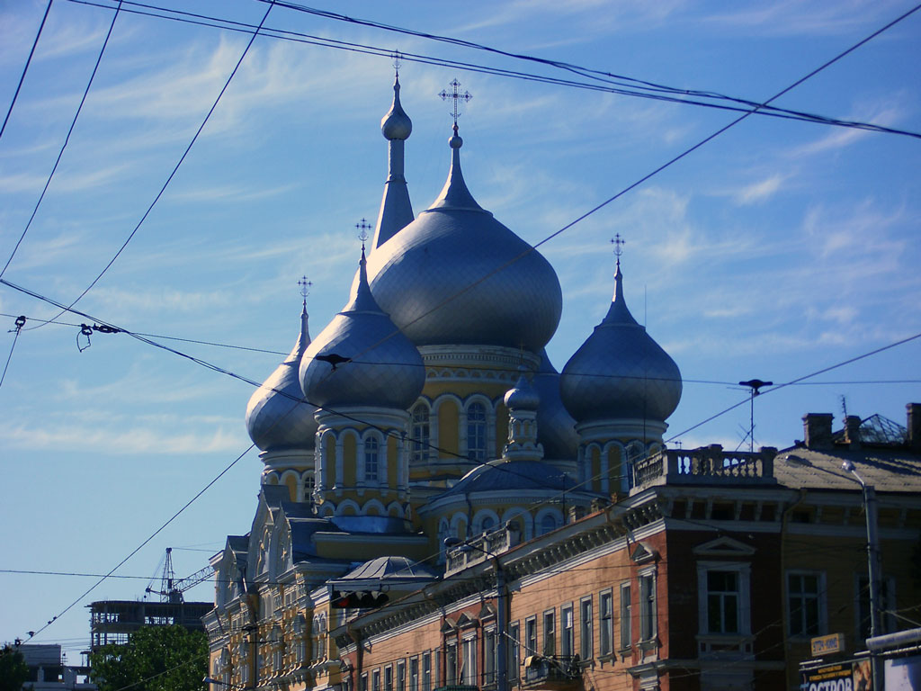 Pantelejmonowski Kirche, Odessa, Ukraine